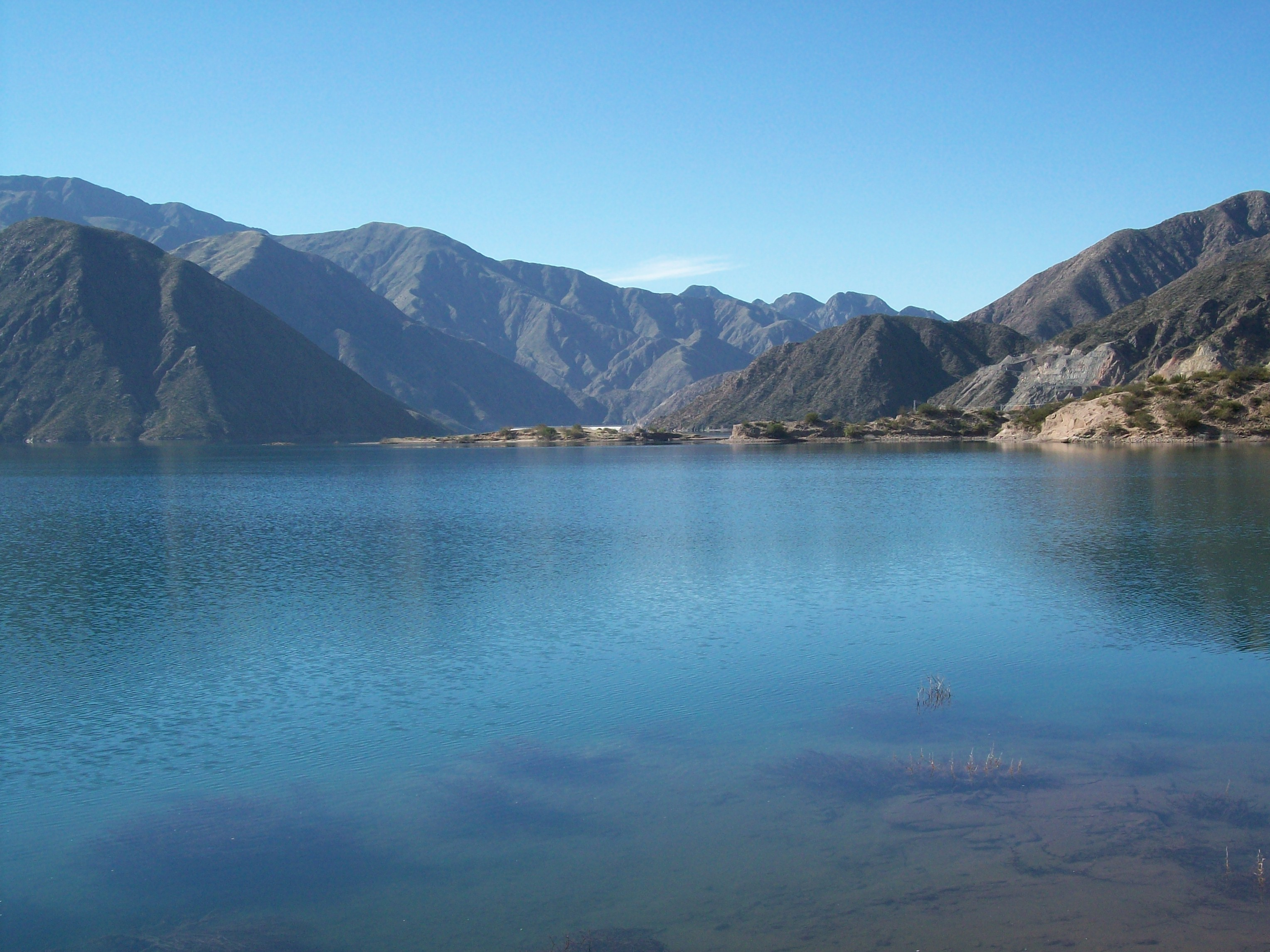 Panorámica del dique Potrerillos